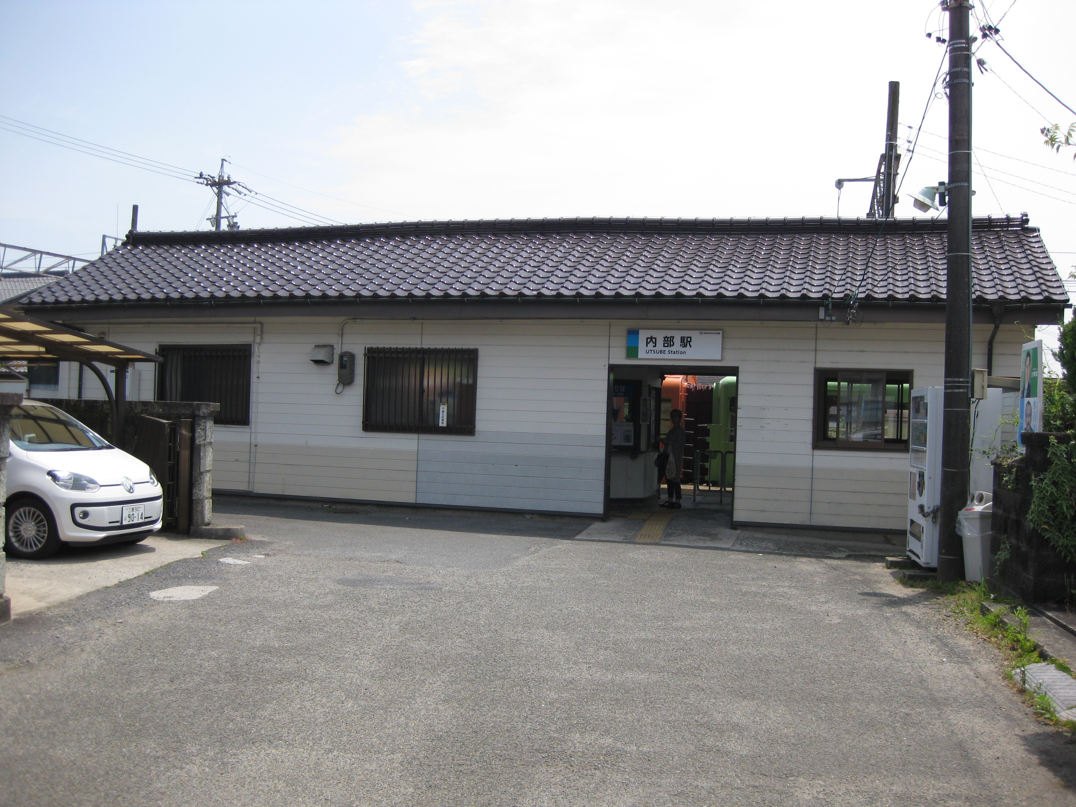 あすなろう鉄道転換後の内部駅